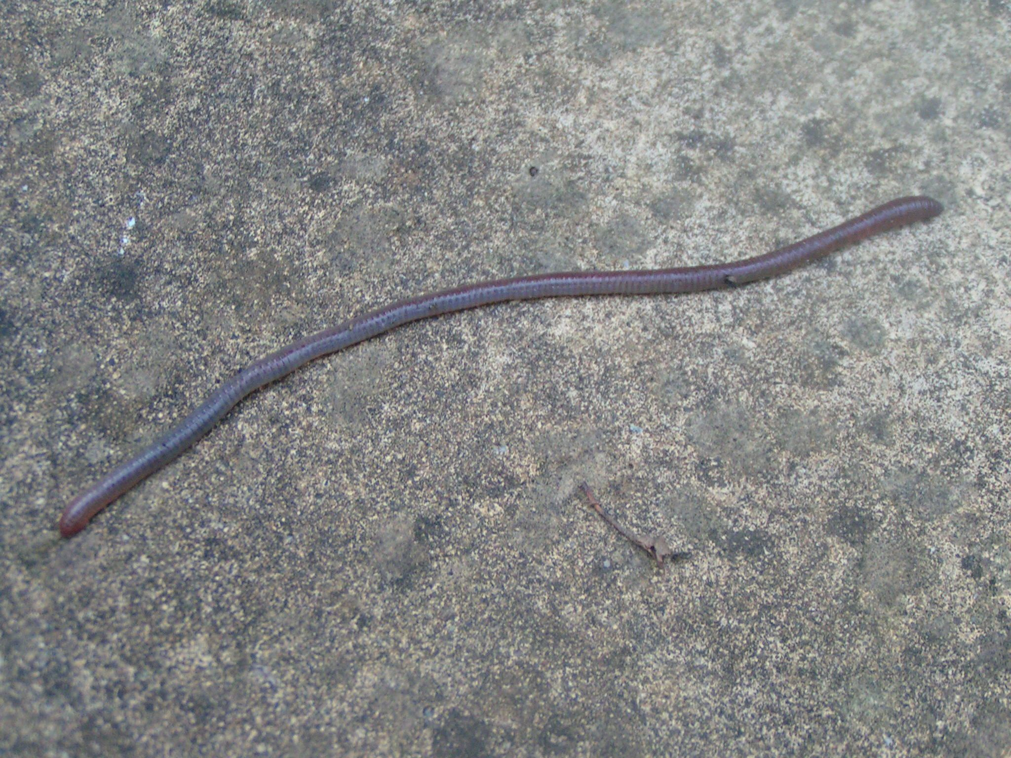 Helodrilus caliginosus; Regenworm